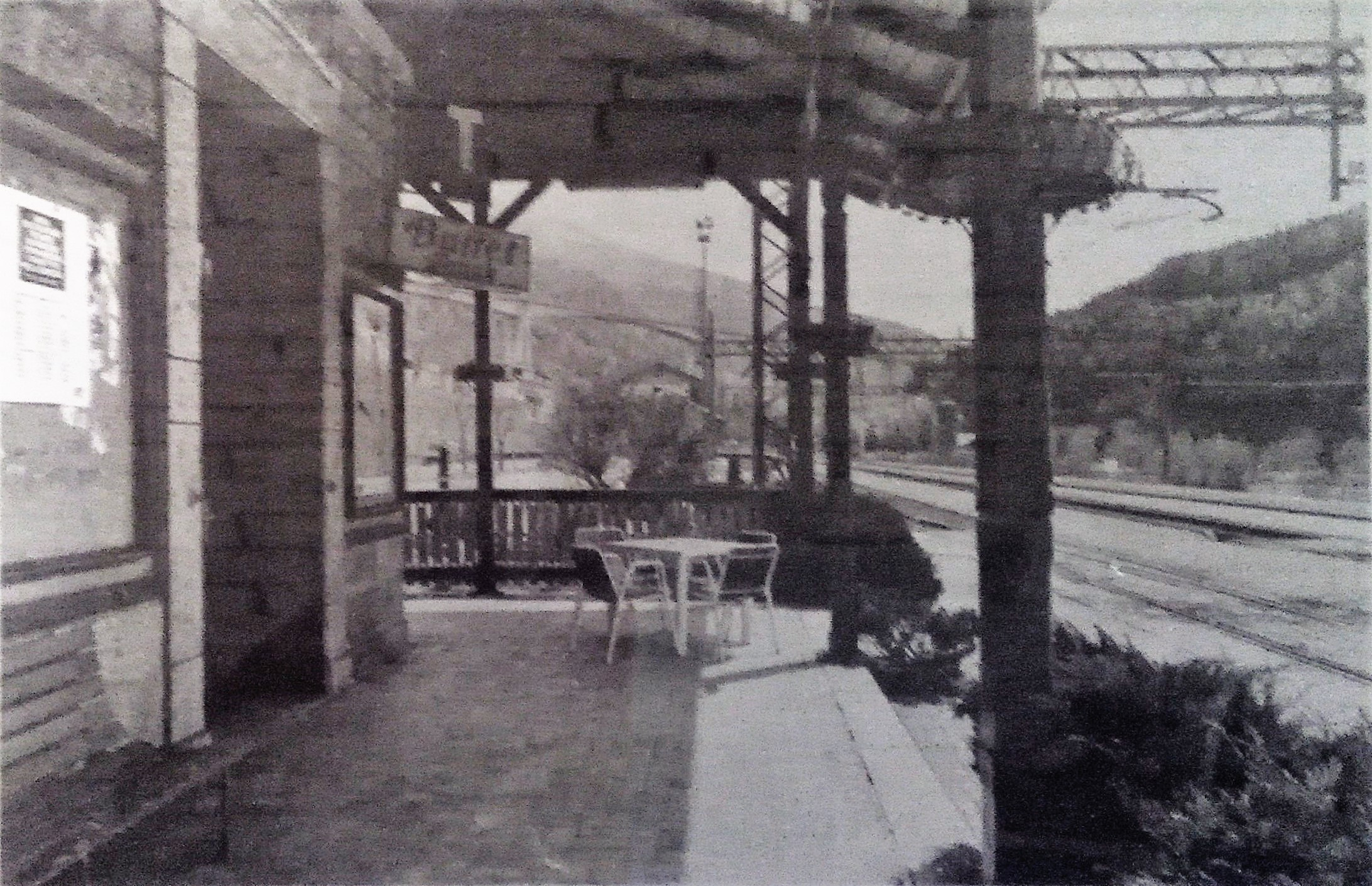 Colle Isarco - Stazione vista verso sud